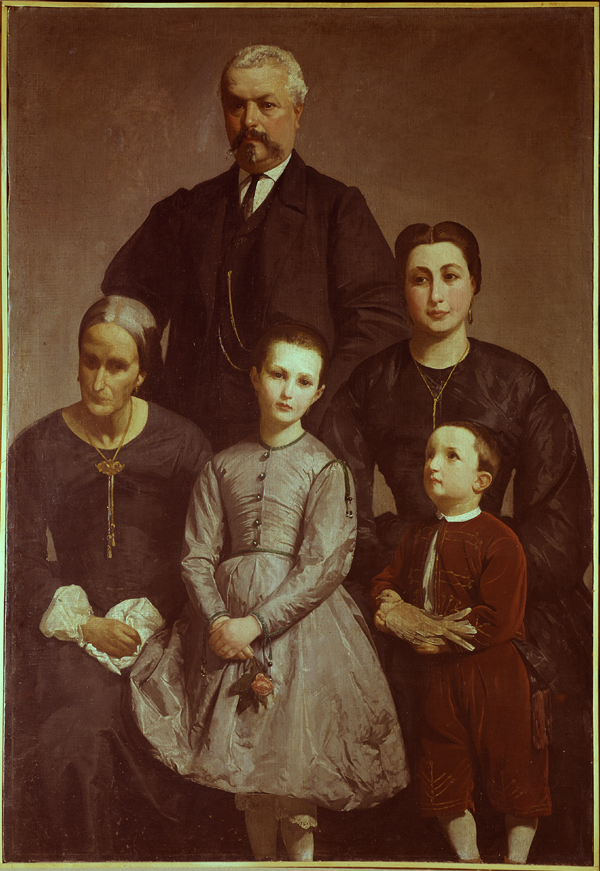 Antonio Berti, La famiglia Castellani (1867-69), Olio su tela, cm. 173x120, Pinacoteca comunale di Faenza, n.inv. 771